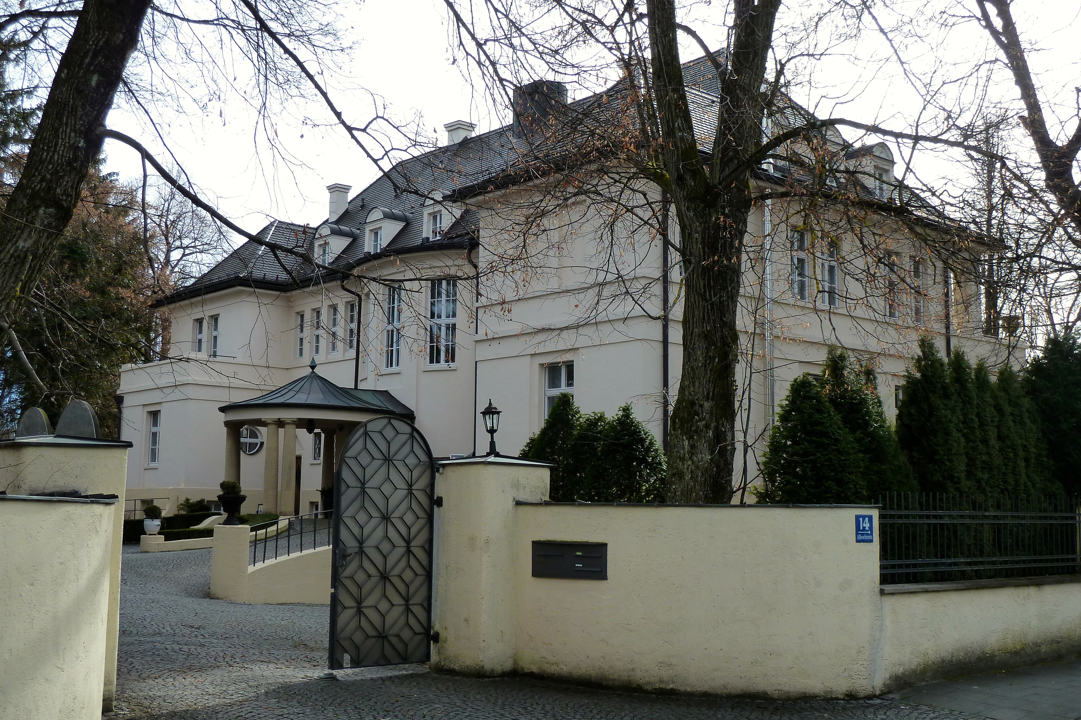 Allescherstraße 14, , 81479 München "Pfaff Villa"